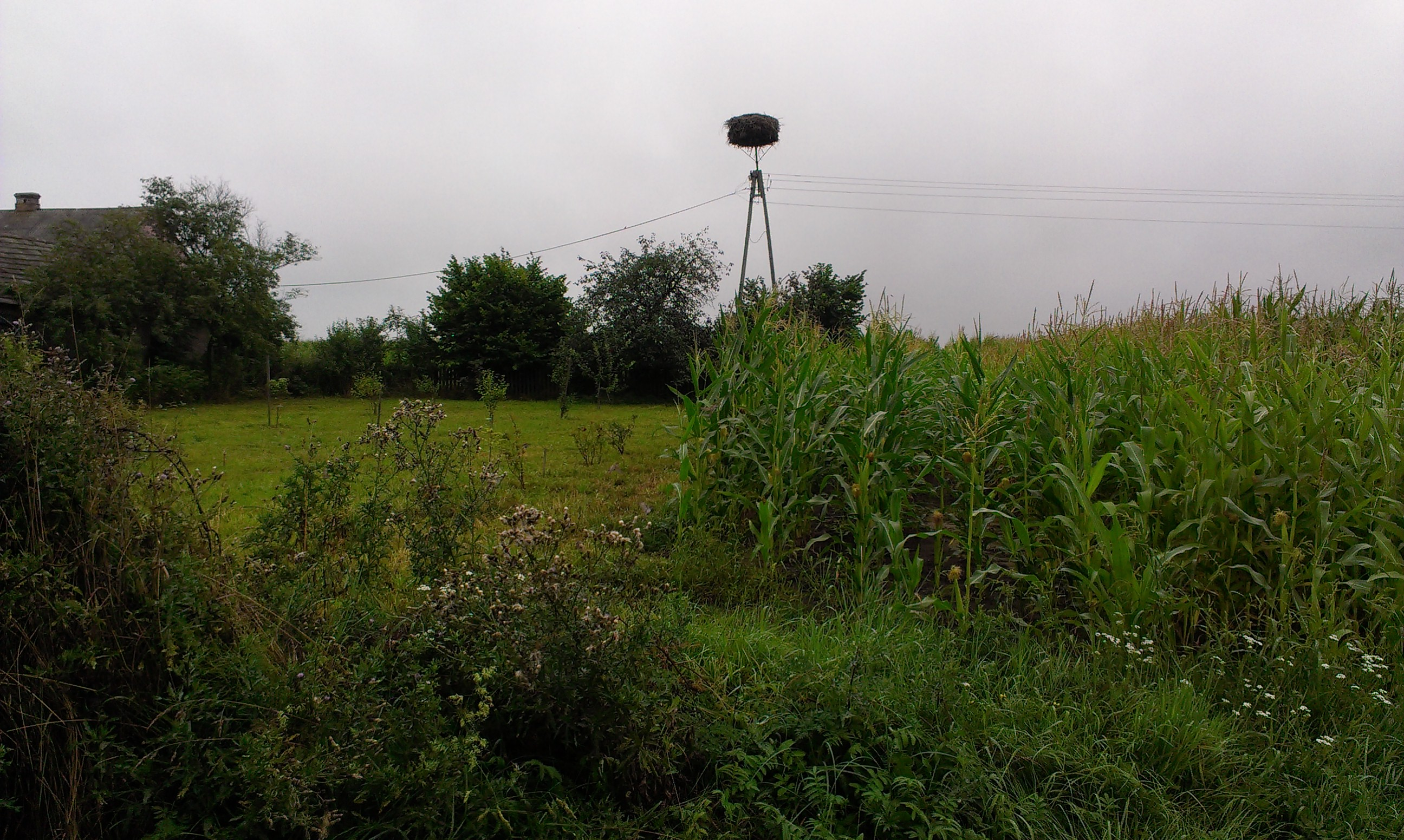 Gniazdo bociana białego znajdujące się we wsi Żołoćki